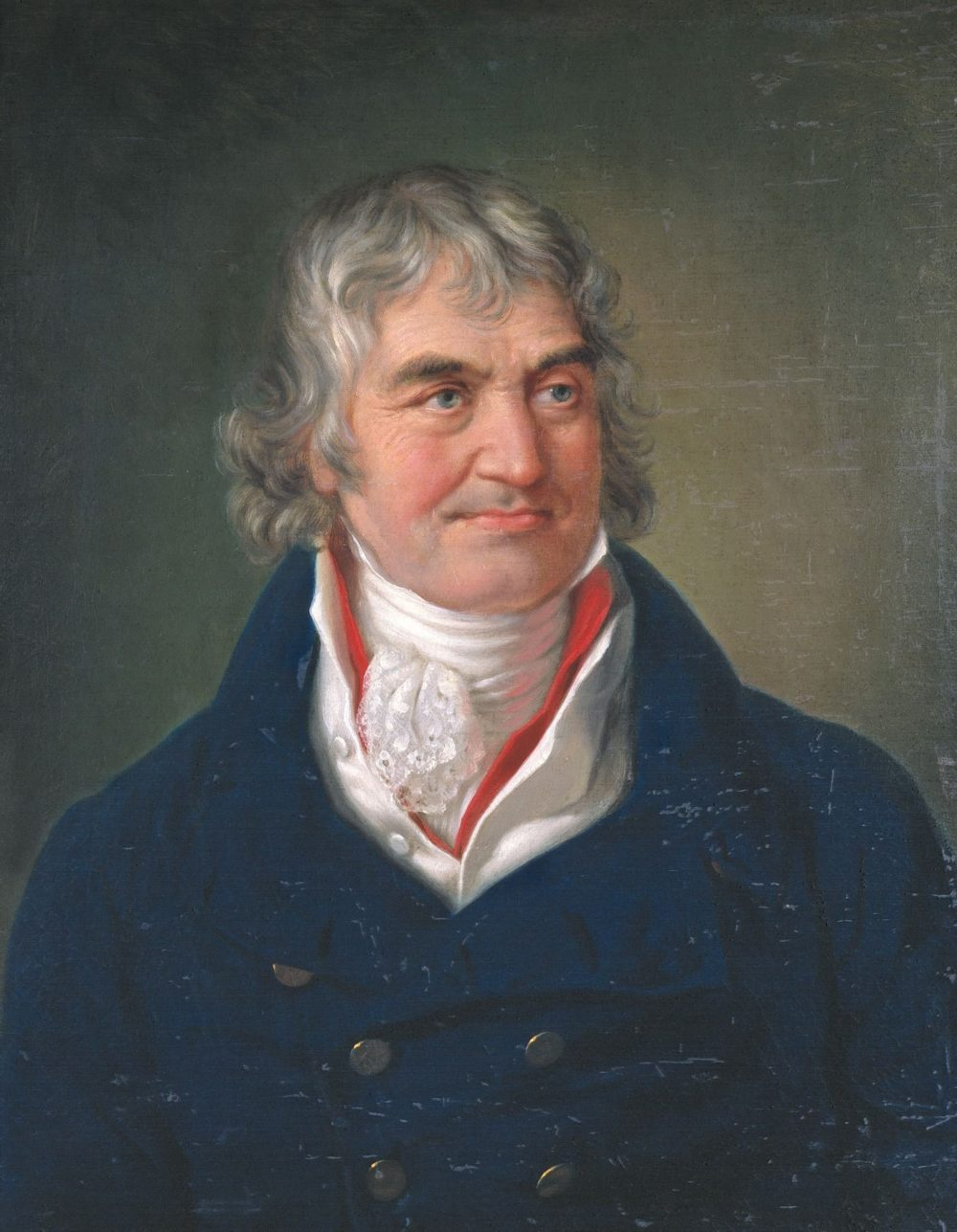 Brustbild als Ölgemälde des hannoverschen Bäckermeisters und Getreidehändlers Johann Georg Helmcke durch denum 1815 oder 1816 zum Königlich Hannoverschen Hofmaler erhobenen belgischen Kunstmaler Melchior Gommar Tieleman ...